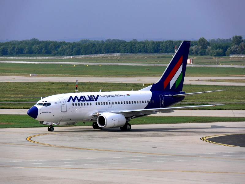 Boeing 737-600 Malév Hungarian Airlines, Budapest